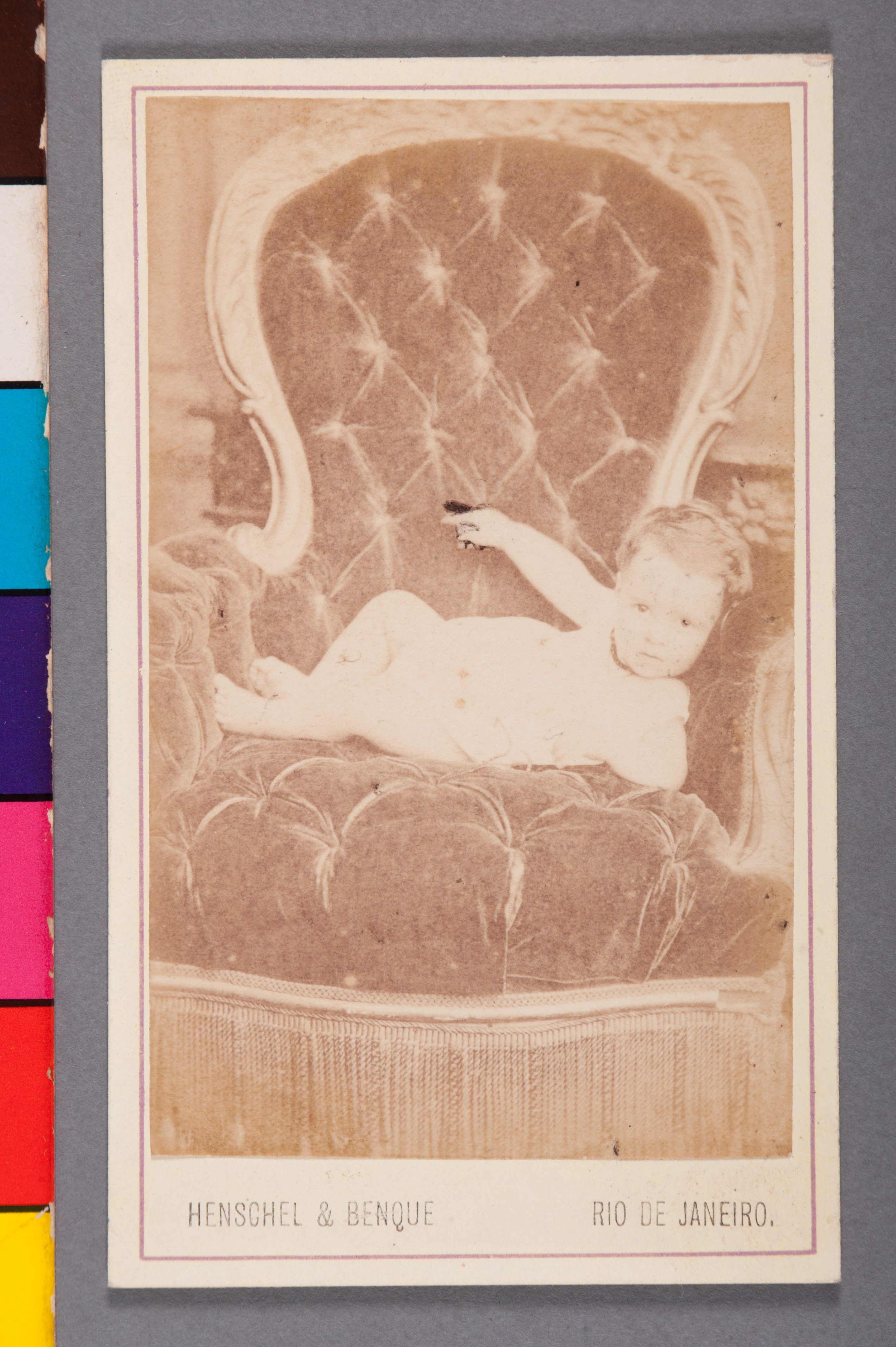 Obra que integra o acervo do Museu Paulista da USP. Coleção Carlos Eugênio Marcondes de Moura. Reg. Agente: Photographia Allemã. Henschel & Benque. Rua Dos Ourives, 40